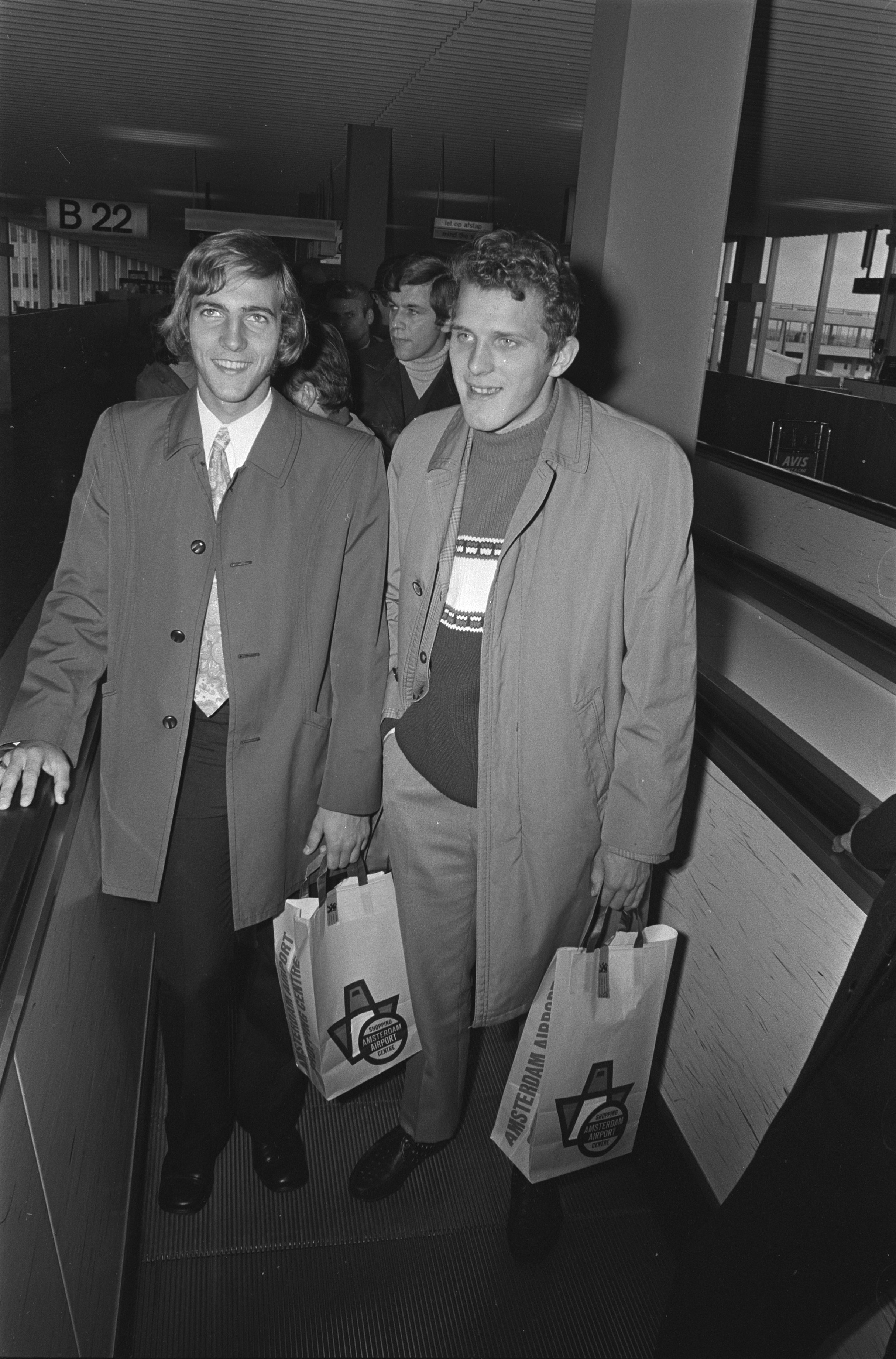 Collectie / Archief : Fotocollectie Anefo Reportage / Serie : [ onbekend ] Beschrijving : Nederlands elftal en Jong Oranje vertrekken van Schiphol naar Oost-Duitsland; links Johan Neeskens (debutant Ned. elftal en rechts Rene van der Datum : 9 november 1970 Locatie : Noord-Holland, Schiphol Trefwoorden : sport, voetballers Persoonsnaam : Jong Oranje, Neeskens, Johan Fotograaf : Evers, Joost / Anefo Auteursrechthebbende : Nationaal Archief Materiaalsoort : Negatief (zwart/wit) Nummer archiefinventaris : bekijk toegang 2.24.01.05 Bestanddeelnummer : 923-9966